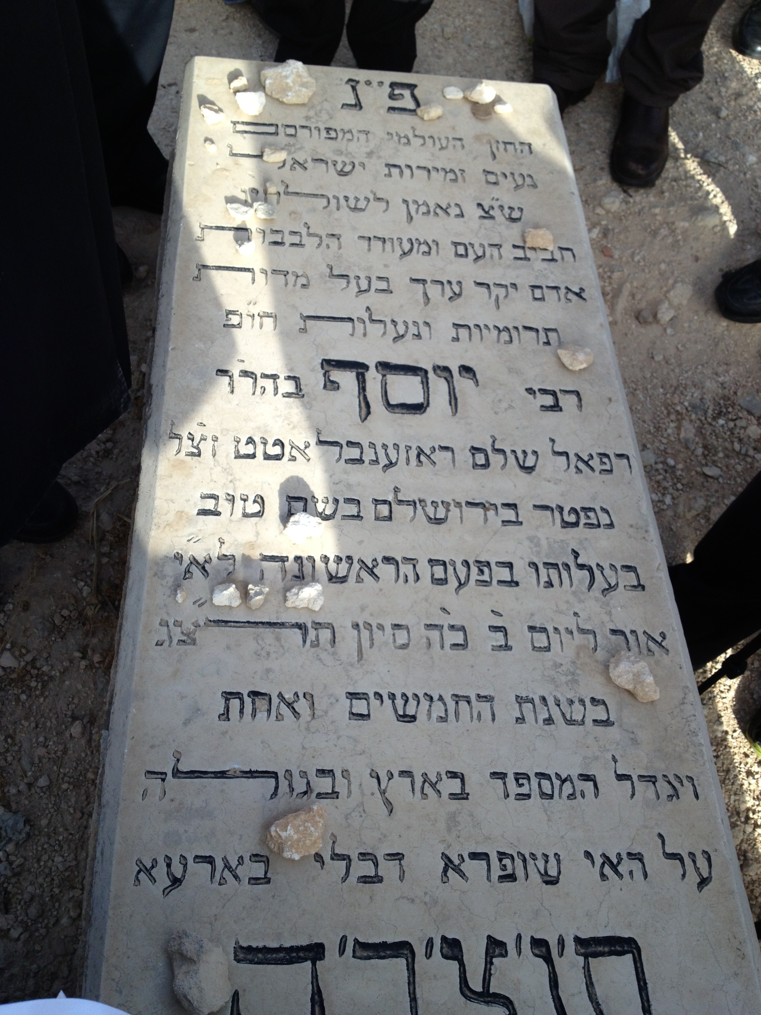 מצבת קברו של החזן יוסף רוזנבלט בהר הזיתים, צולם בחודש סיוון תשע"ג